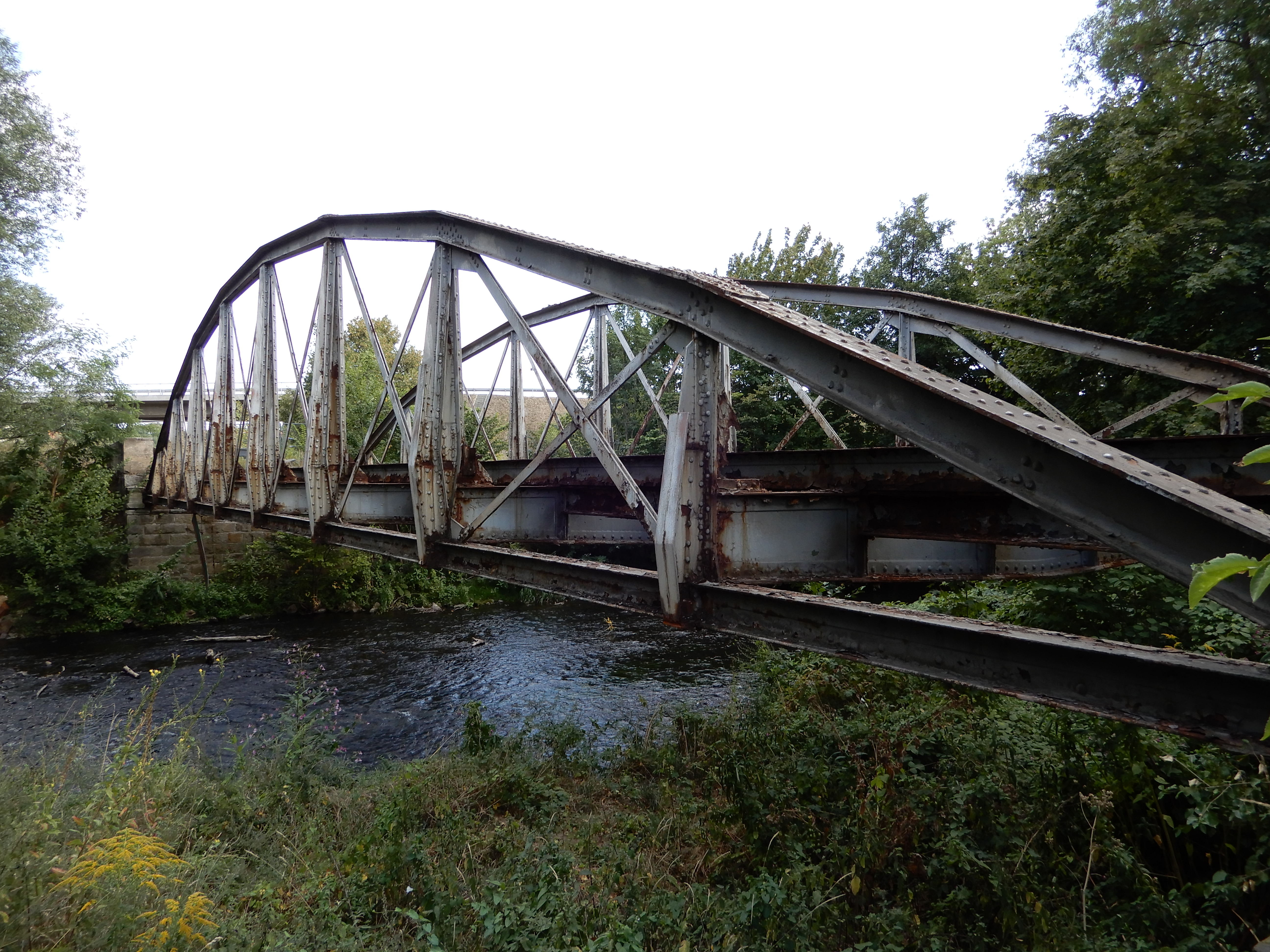 Friedensbrücke Quedlinburger Straße (Neinstedt)